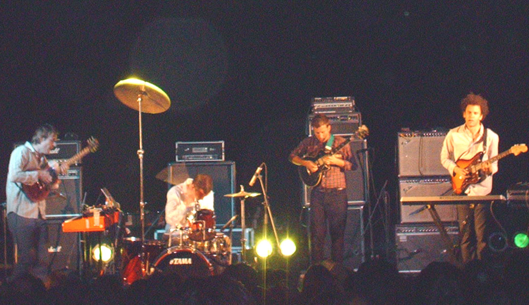 Battles en Santiago de Chile